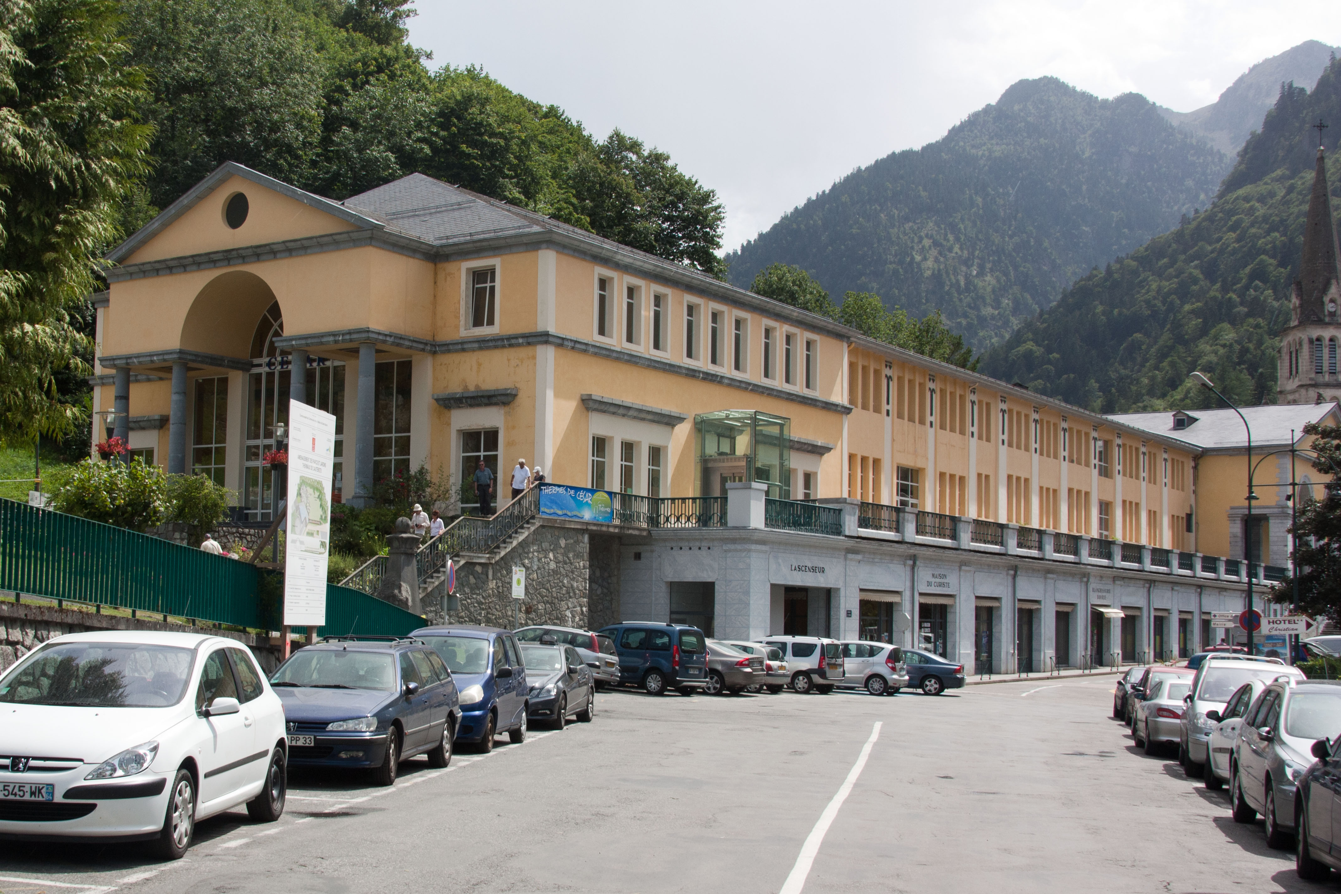 Les Thermes de César, Cauterets, Hautes-Pyrénées, France